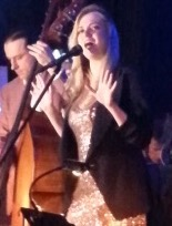 Polska piosenkarka rosyjskiego pochodzenia Sasha Strunin podczas koncertu.